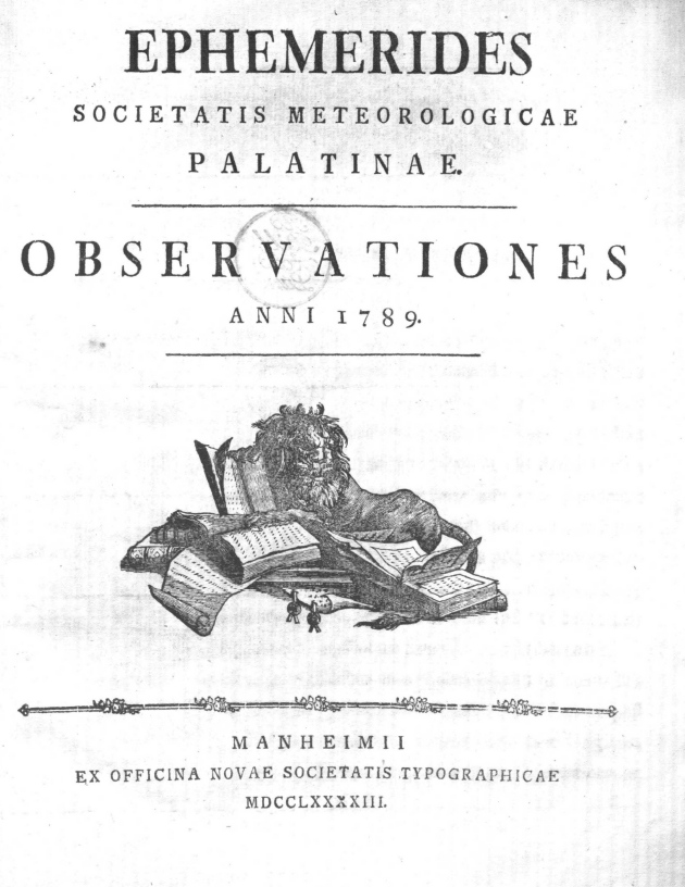 Societas Meteorologica Palatina Mannheim, Titelblatt der Ephemerides Societatis Meteorologicae Palatinae. observationes anni 1789